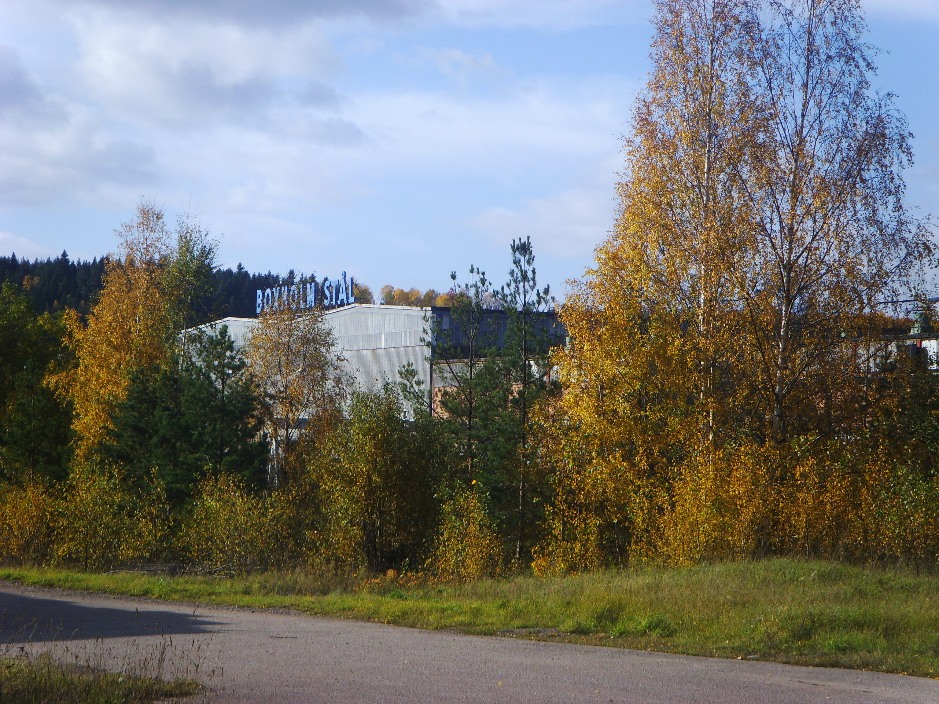 Bruksområdet i Boxholm.